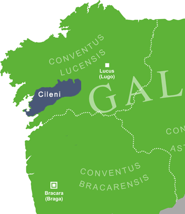 Mapa que amosa situación aproximada da tribo dos cilenos, na provincia romana da Gallaecia